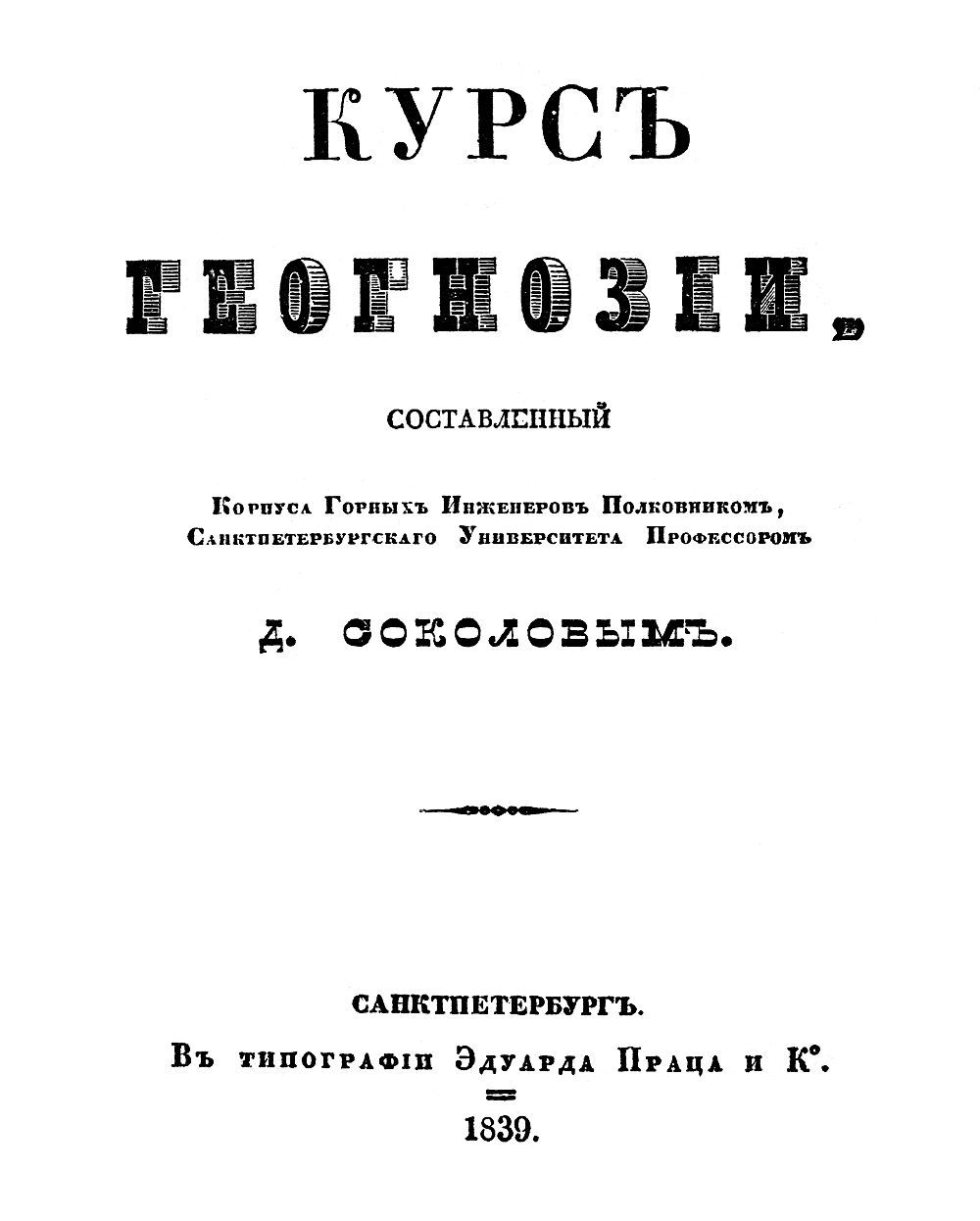 Учебник Геогнозии, 1839.